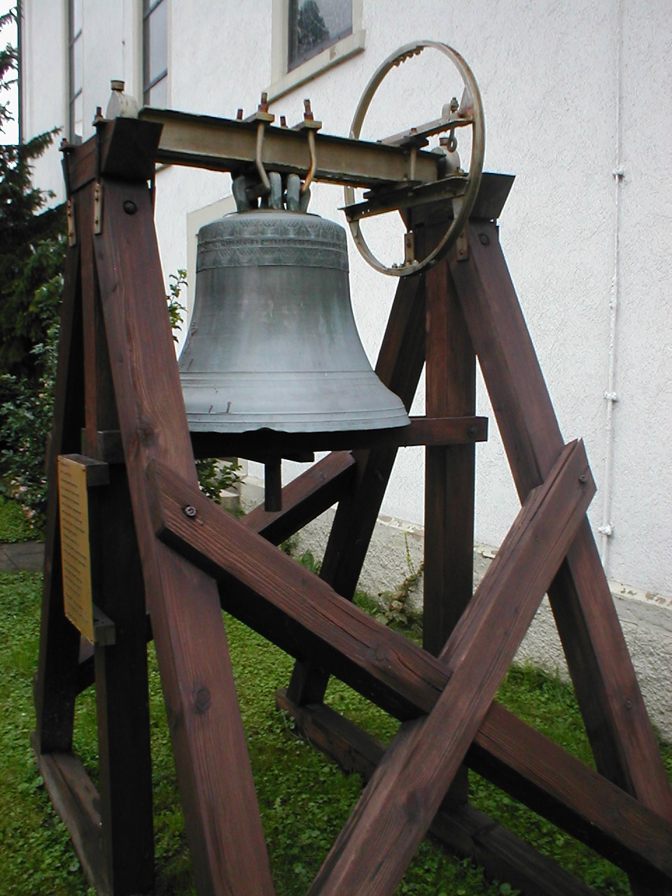 Totenglocke von 1810 bei der katholischen Kirche in Siegelsbach, Baden-Württemberg